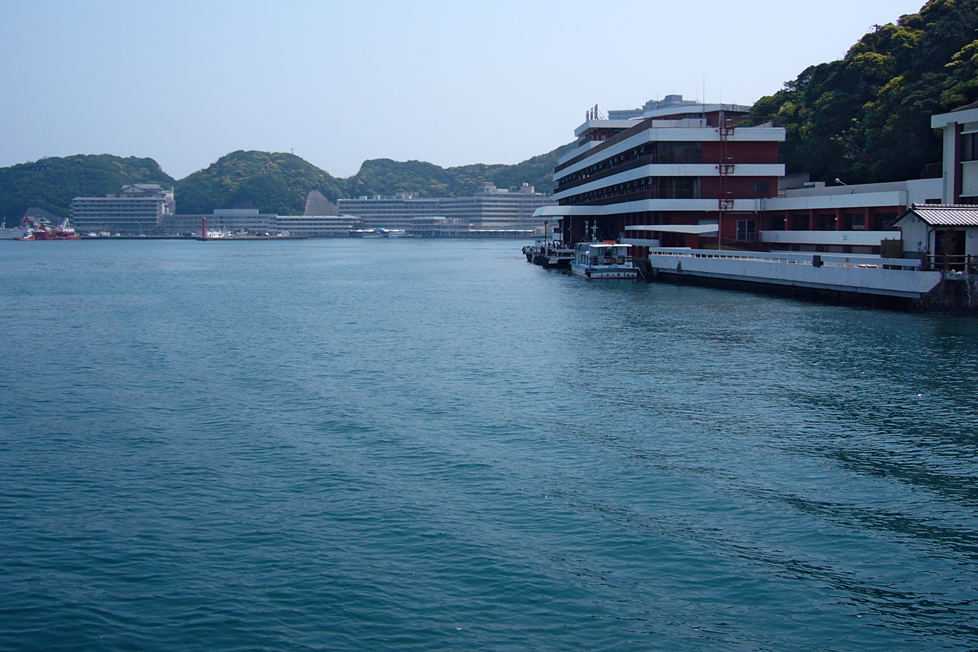 Nanki-Katsuura Onsen in Nachikatsuura, Wakayama